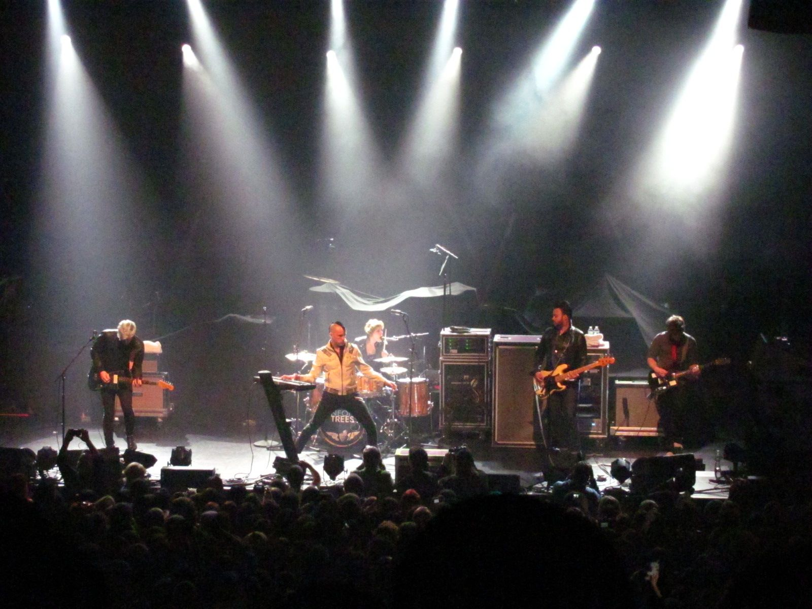 Neon Trees